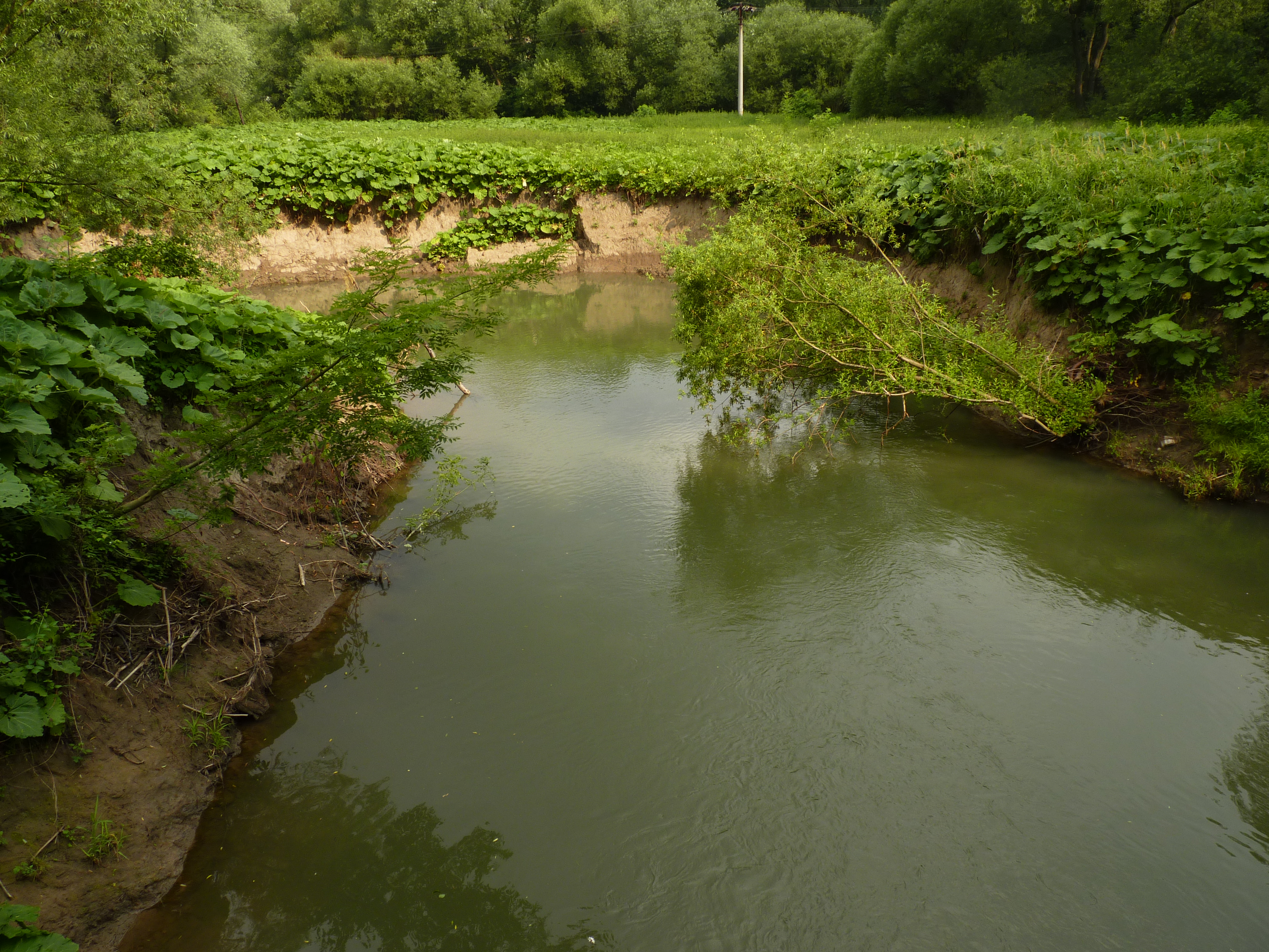 Meandr potoka Lučiny pod zámkem Šumbark. Havířov, Moravskoslezský kraj.